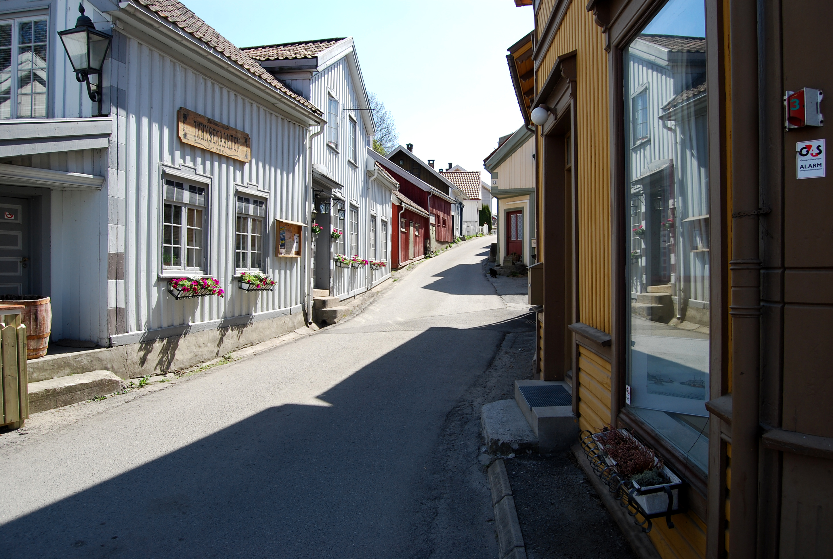 Strandgata på Stathelle 2011.